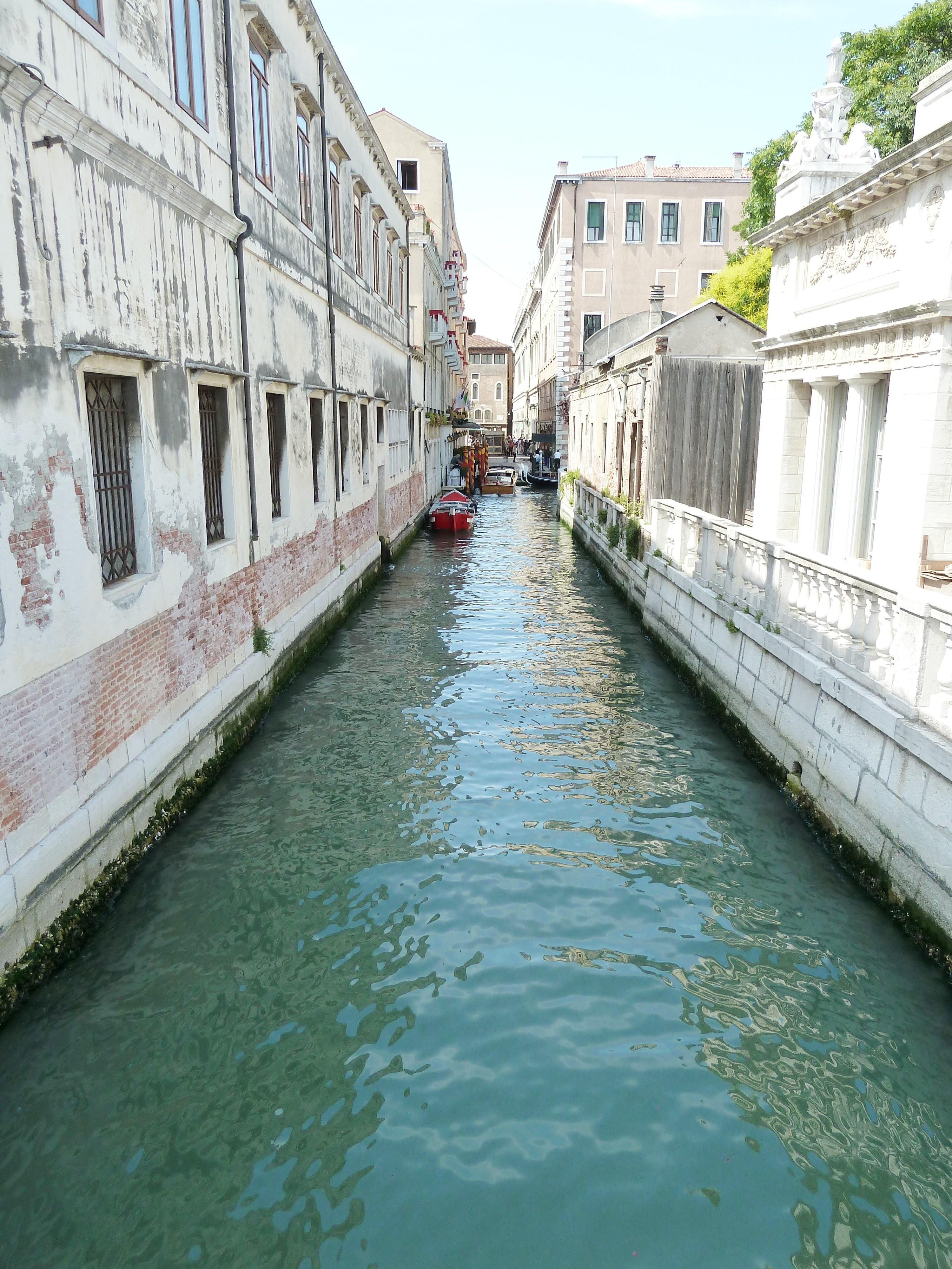 Rio dei Giardinetti (Venice)